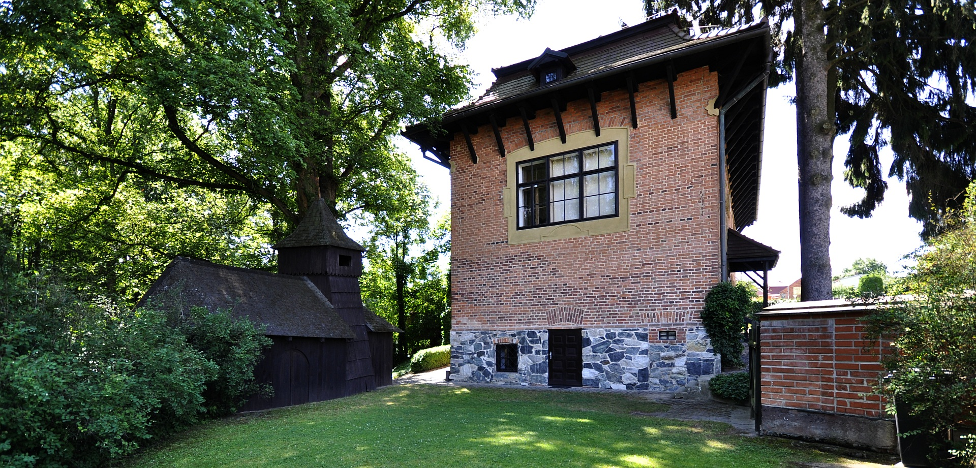 Vila Františka Bílka, Údolní 133, Chýnov.